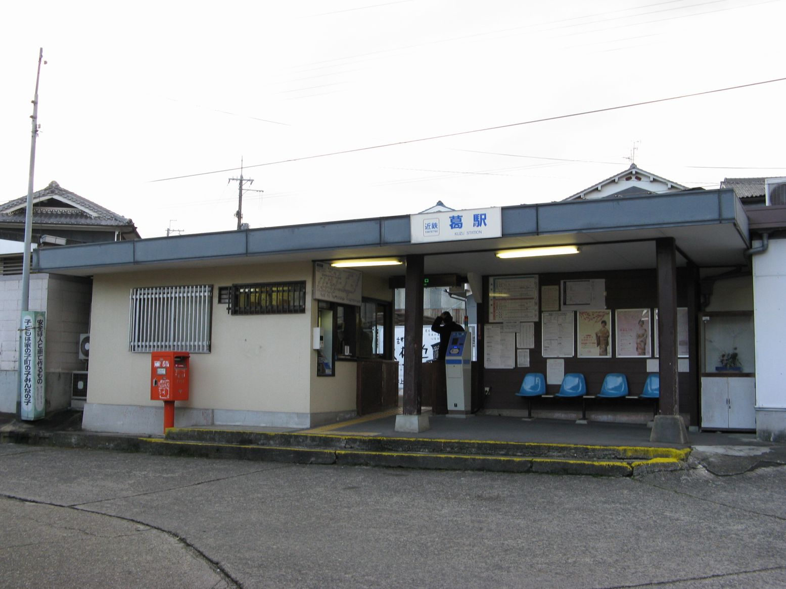 葛駅 駅舎